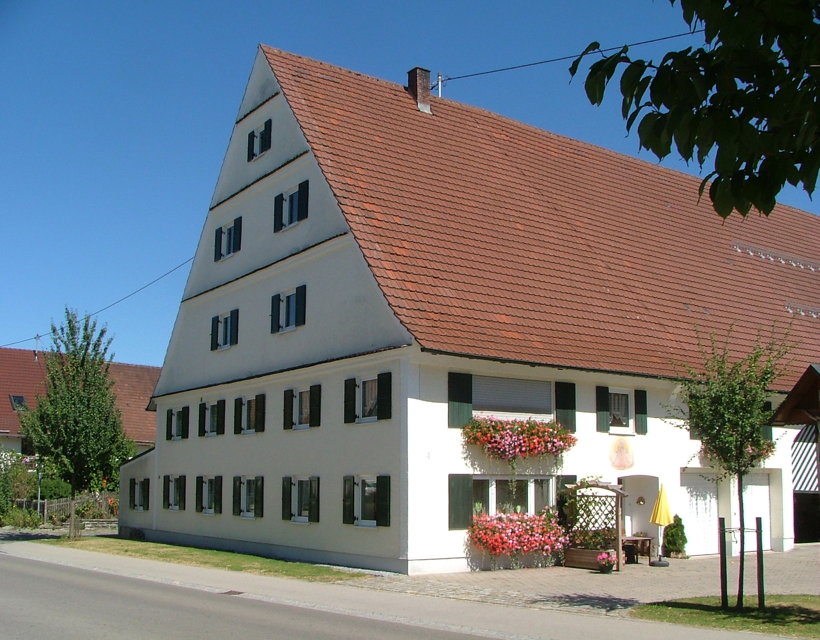 Sontheim